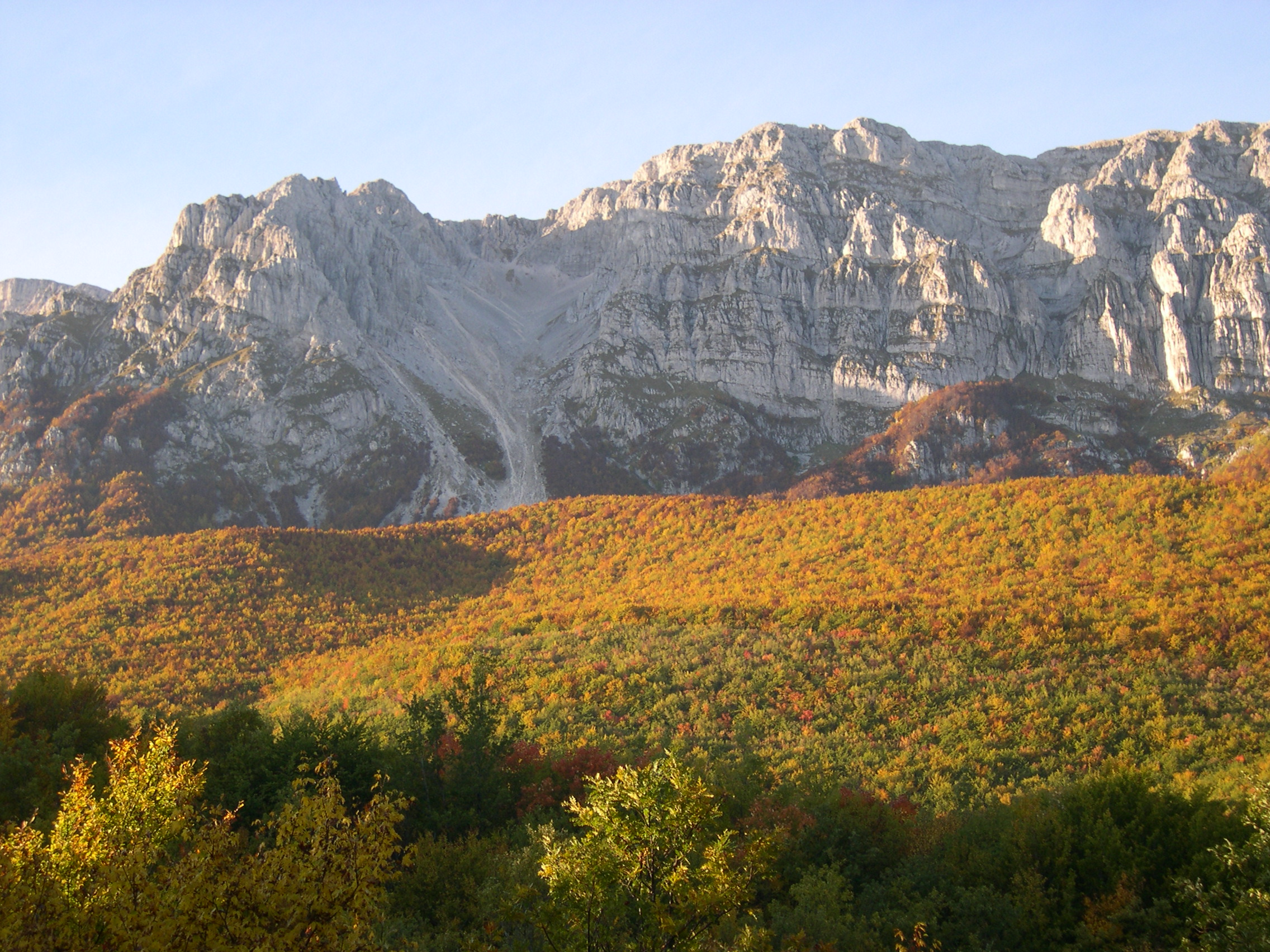 Il Monte Sirente nell'autunno 2005